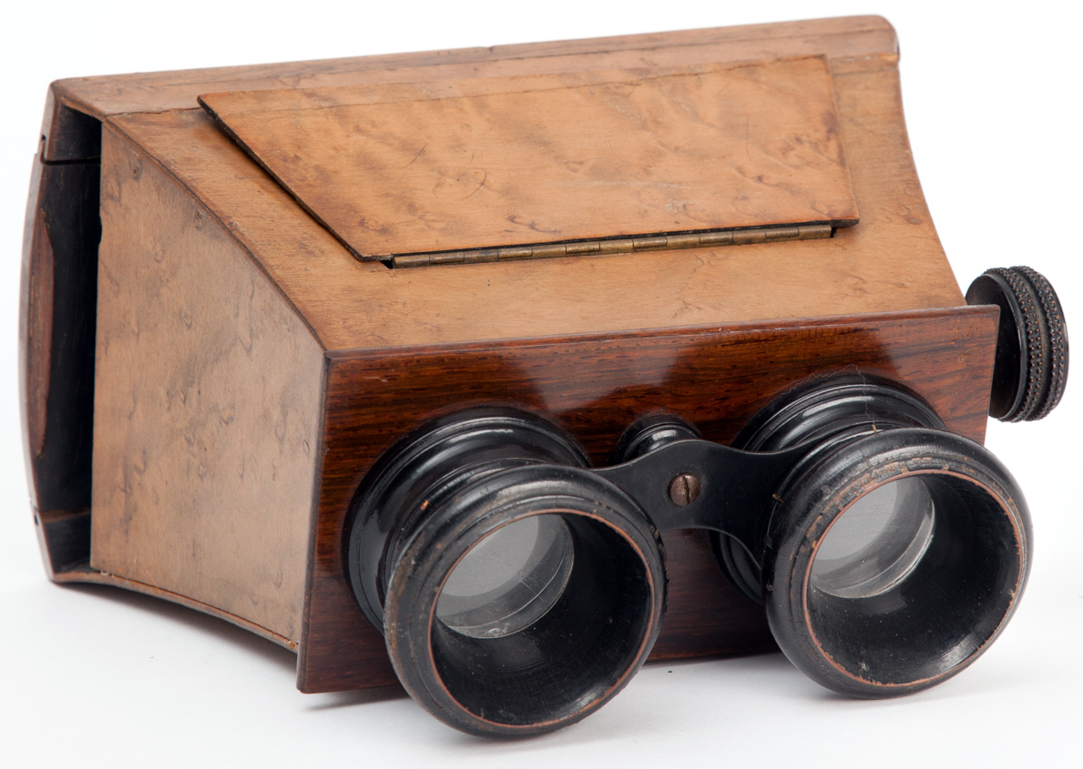 Visore stereoscopico portatile di tipo Brewster, J. Fleury - Hermagis, 1870, con messa a fuoco manuale. Per la visione di lastre e stampe stereoscopiche 8,5x17cm. Museo nazionale della scienza e della tecnologia Leonardo da Vinci, Milano.